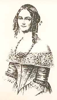 Charlotta Djurström (1807-1877)